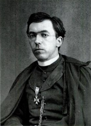 Portrait du chanoine Joseph Schorderet.